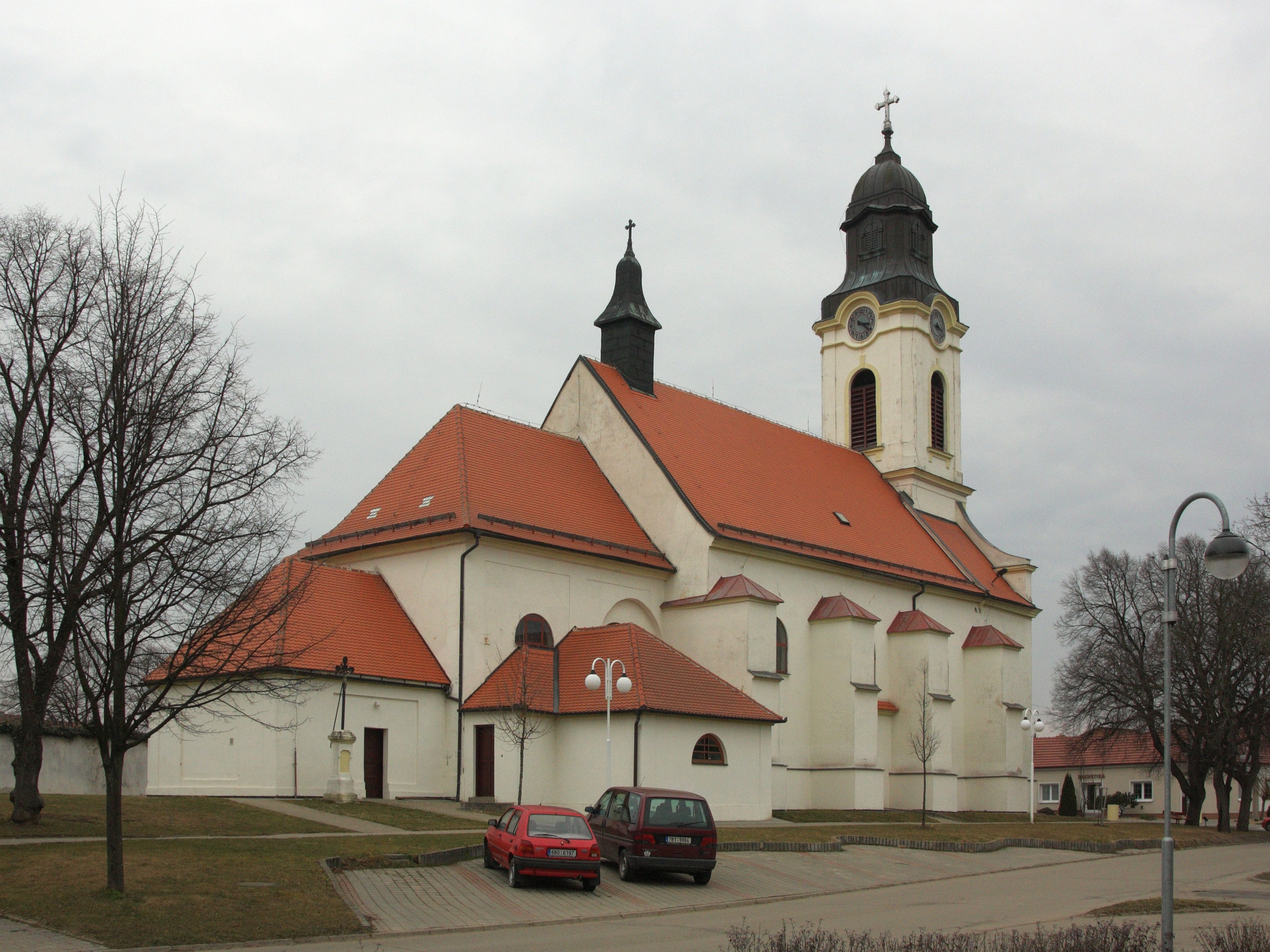 Velké Pavlovice - kostel Nanebevzetí Panny Marie.